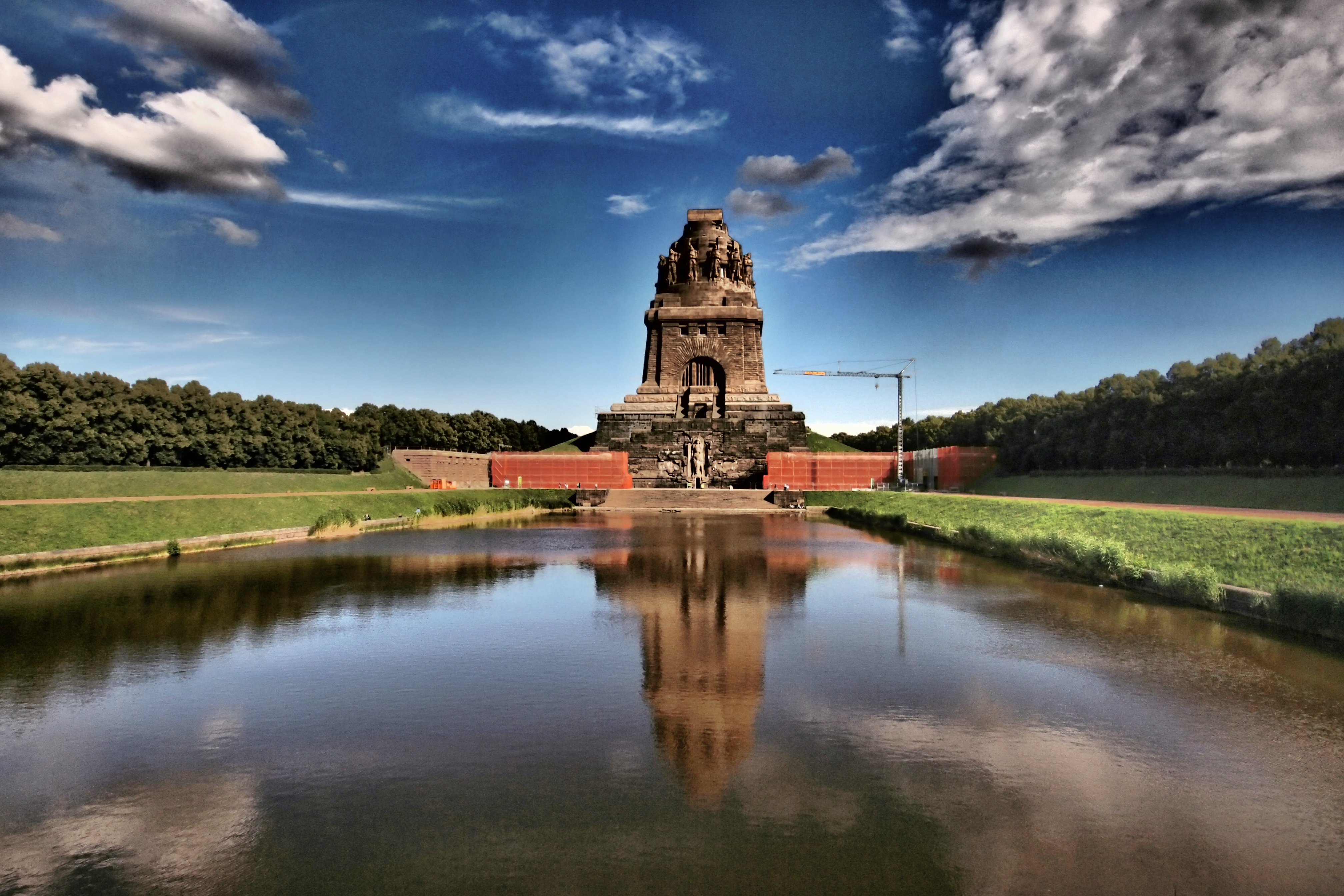 Zum Gedenken an die Völkerschlacht bei Leipzig von 1813 wurde dieses Denkmal erbaut und 1913 eingeweiht. Derzeit wird es saniert. Die Arbeiten sollen bis zum 200. Jahrestag der Völkerschlacht 2013 abgeschlossen sein.